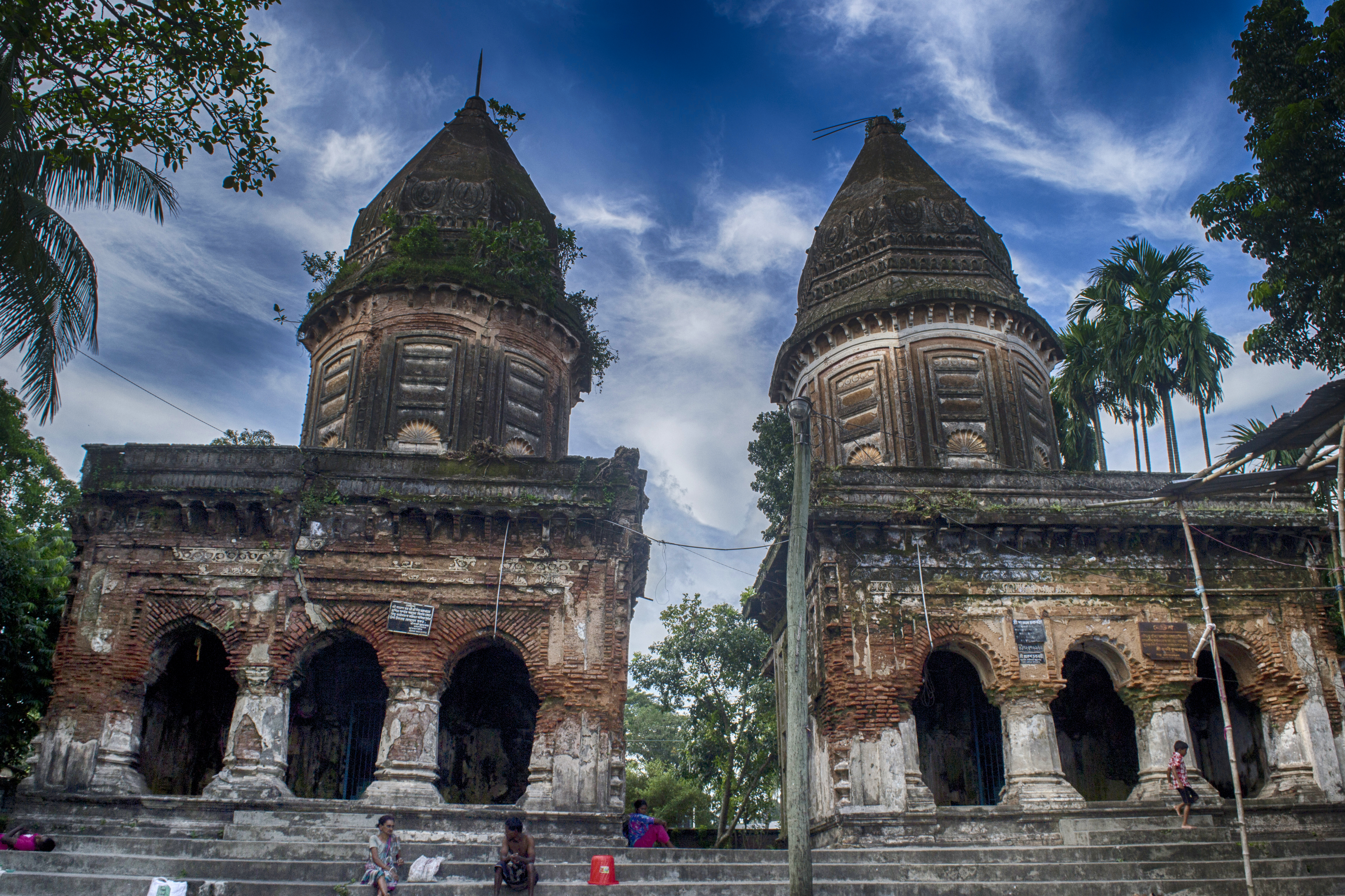 জোড় মন্দির